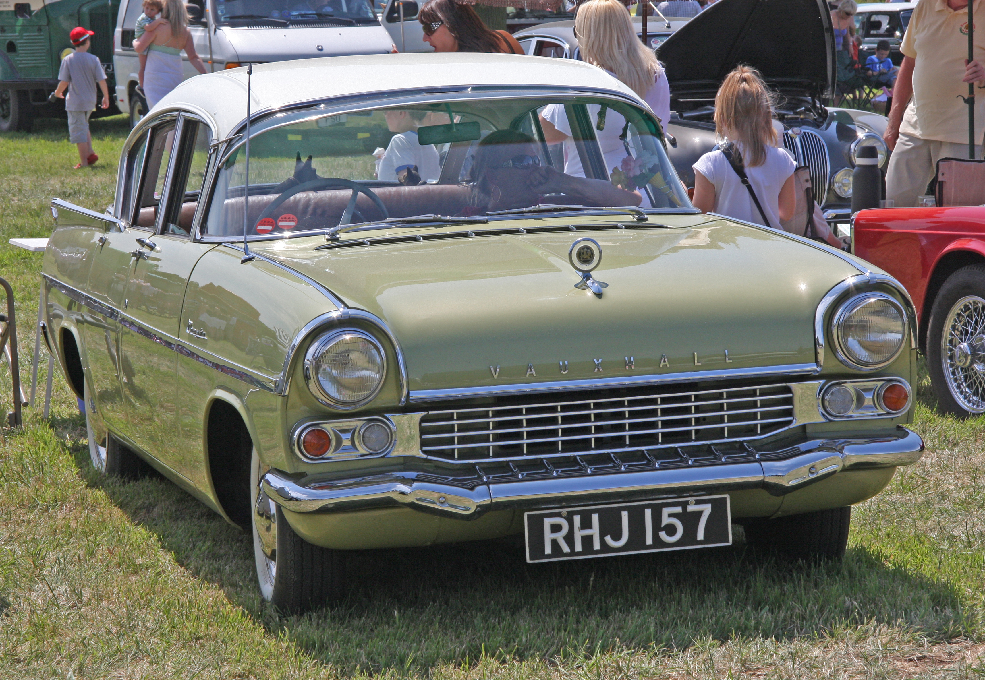 Vauxhall Cresta PA Series